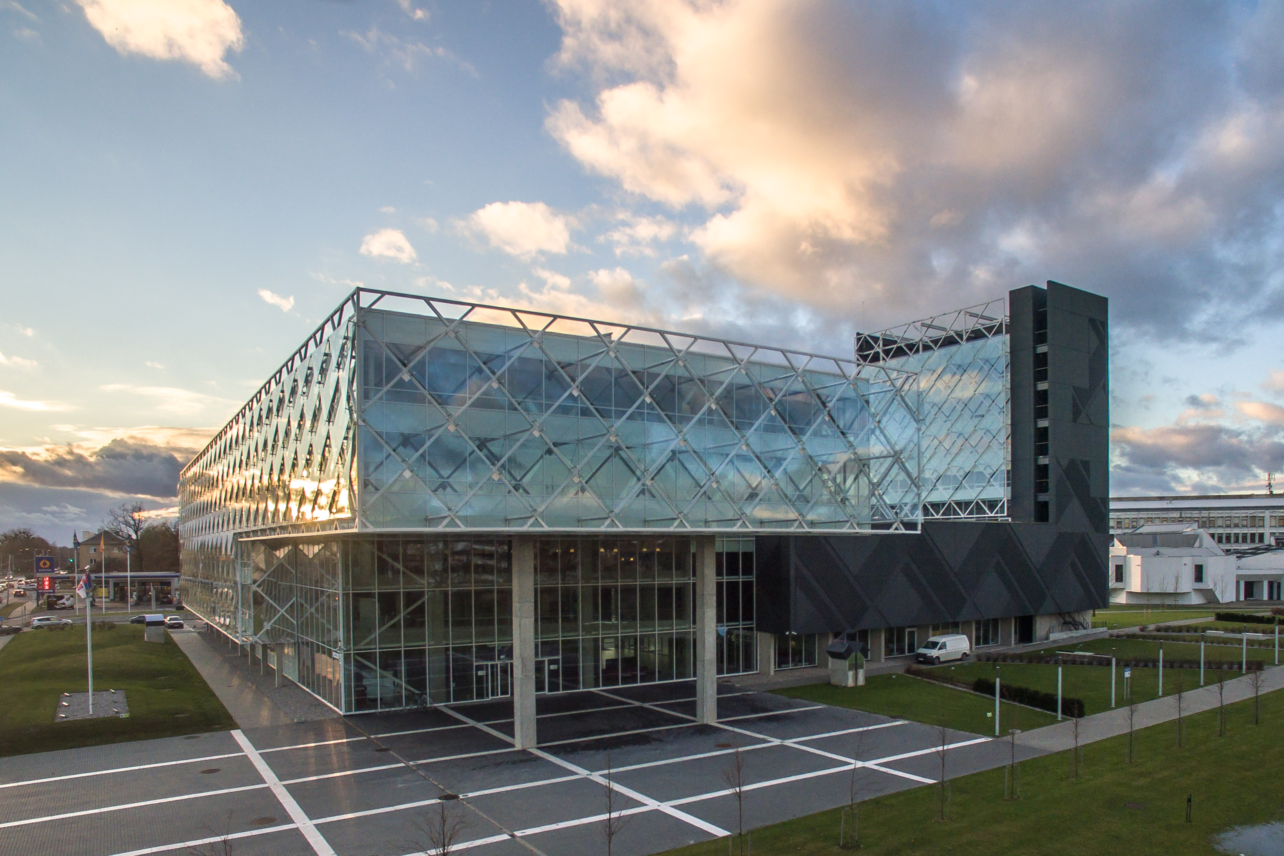 KTU "Santakos" slėnis